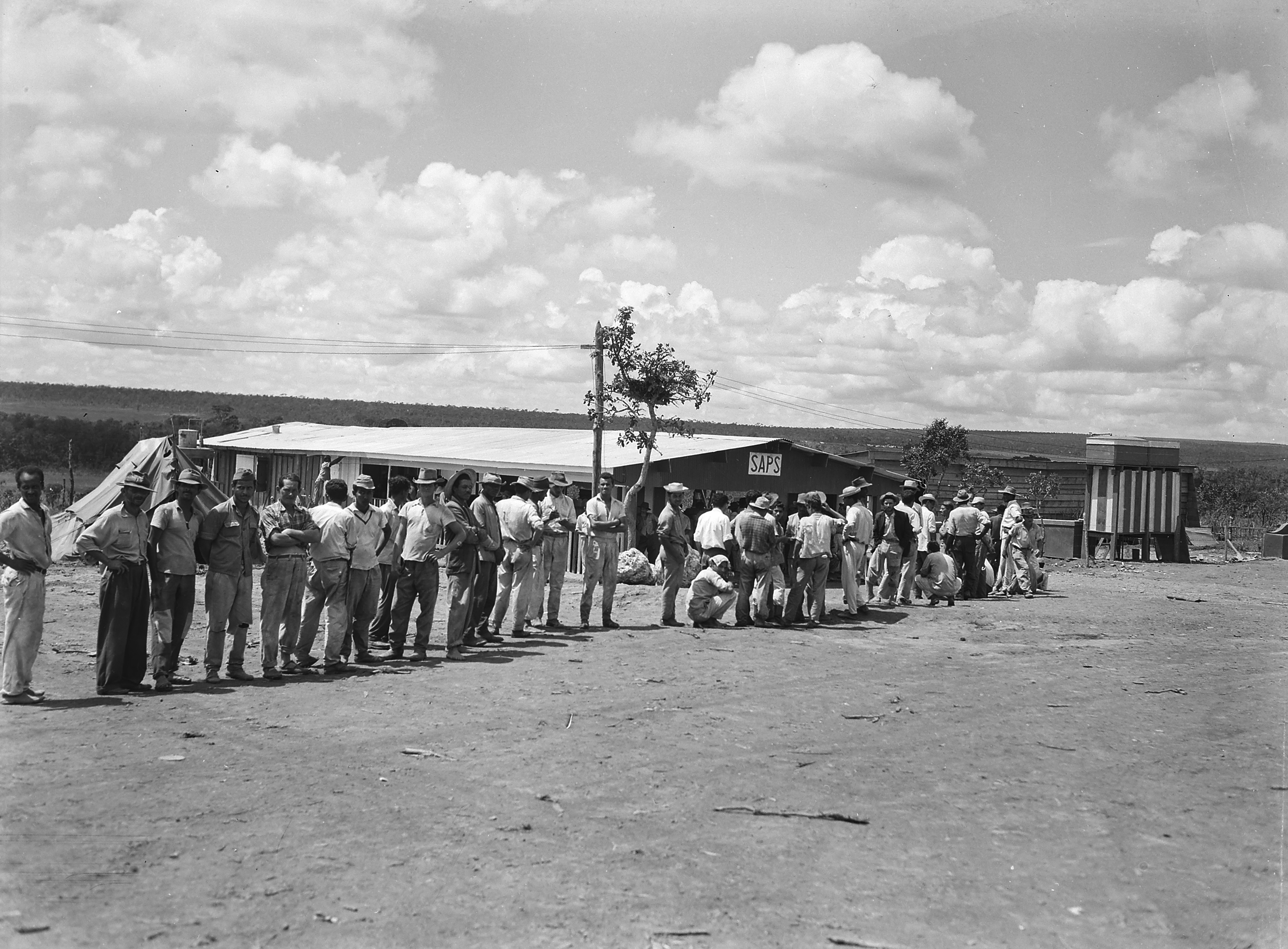 Imagem do Fundo Agência Nacional, do Arquivo Nacional